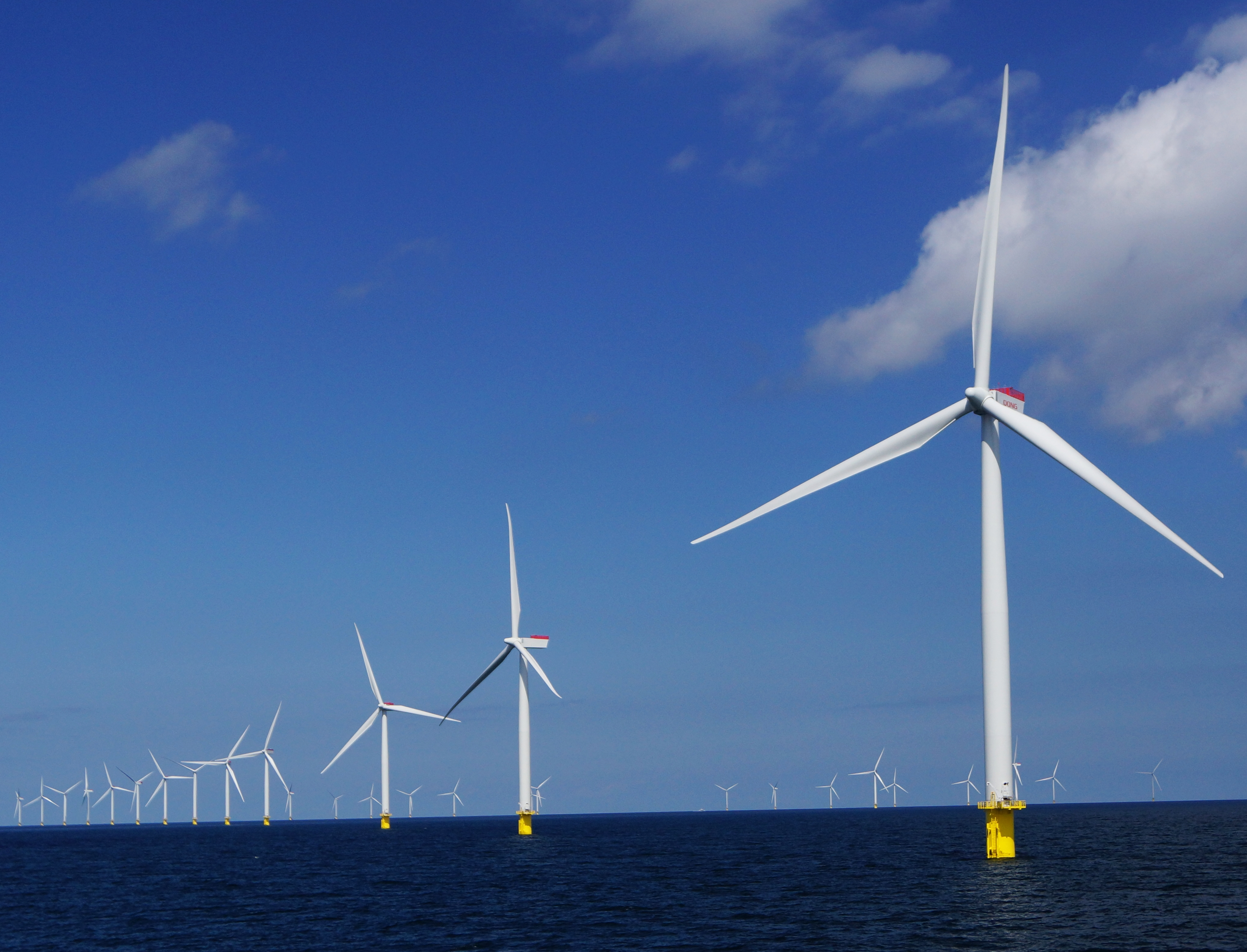 Anholt Havmøllepark